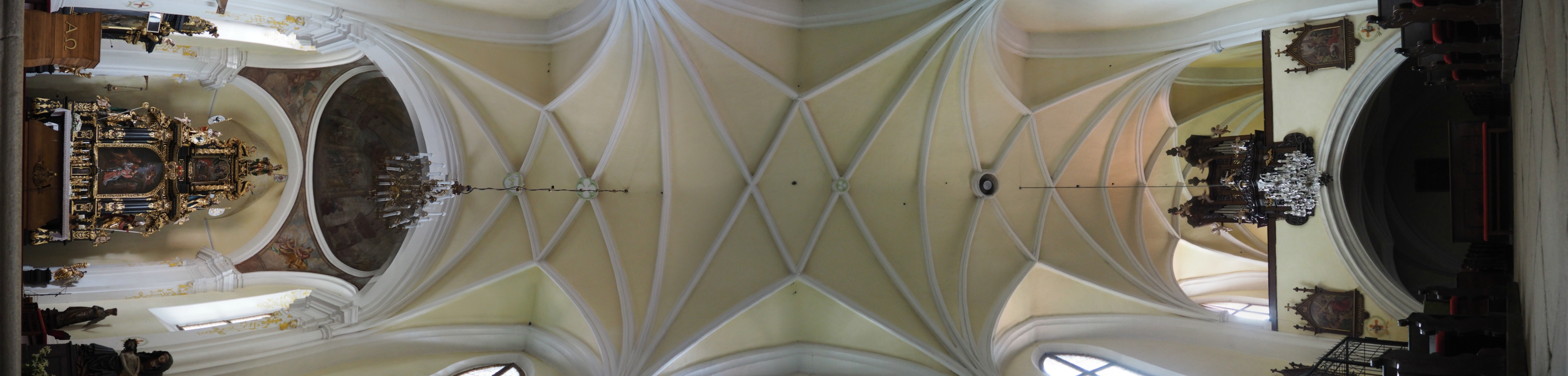 Panoramatický pohled z úrovně dlažby kostela na klenutý strop se svorníky